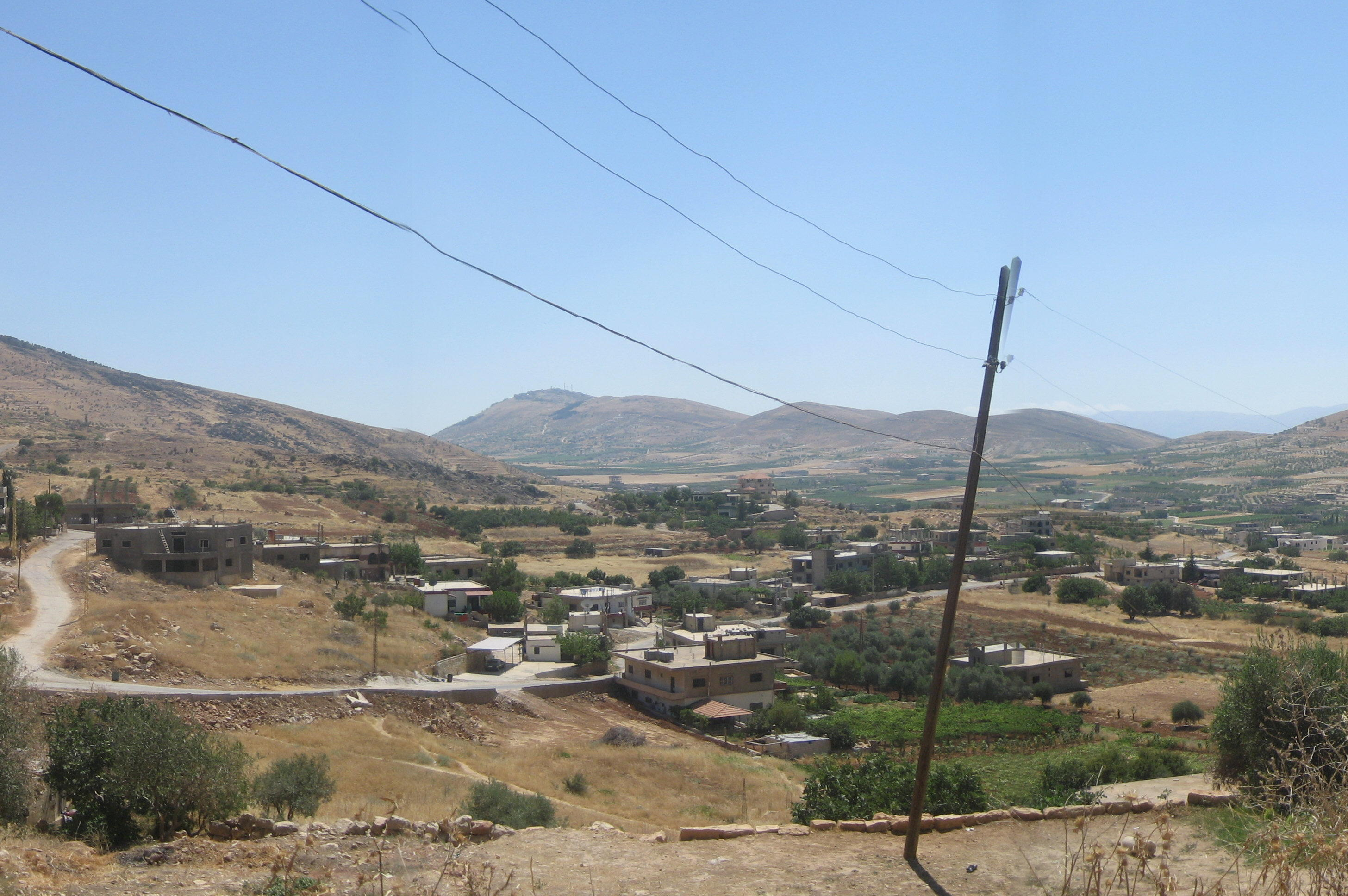 صورة من القرية القديمة لسهل الصويري والعين